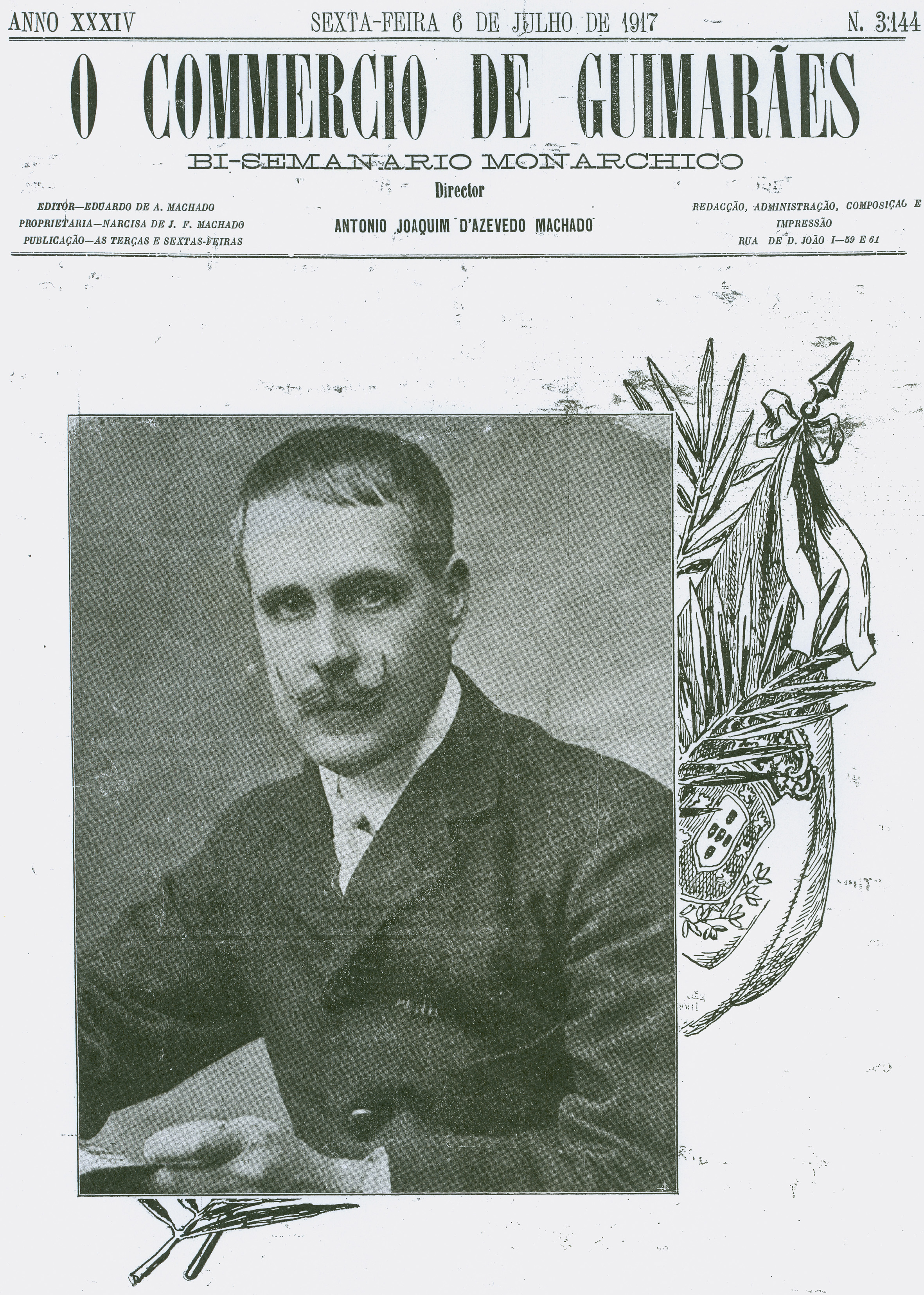 O Commercio de Guimarães